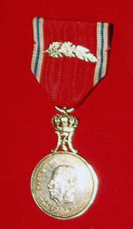 Norska St Olavs-medaljen med eklöv